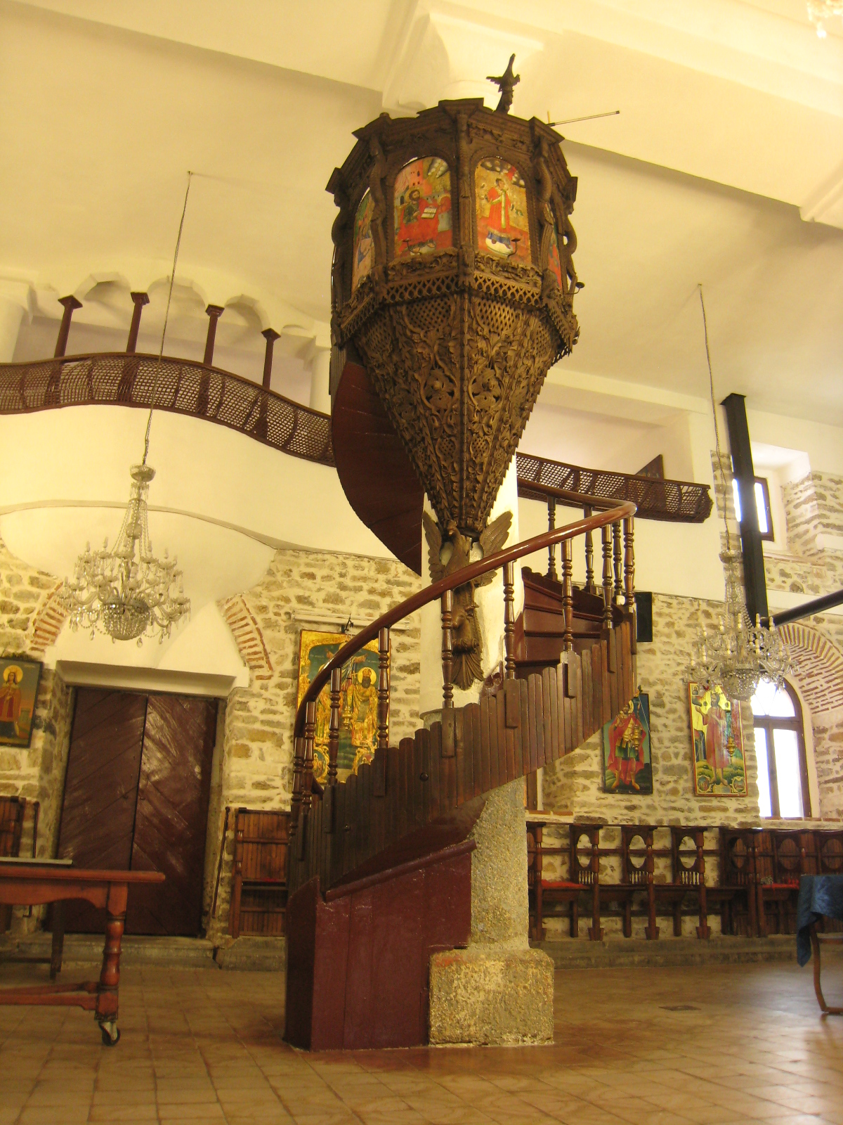 Амвонот, "Св. Благовештение", Прилеп.